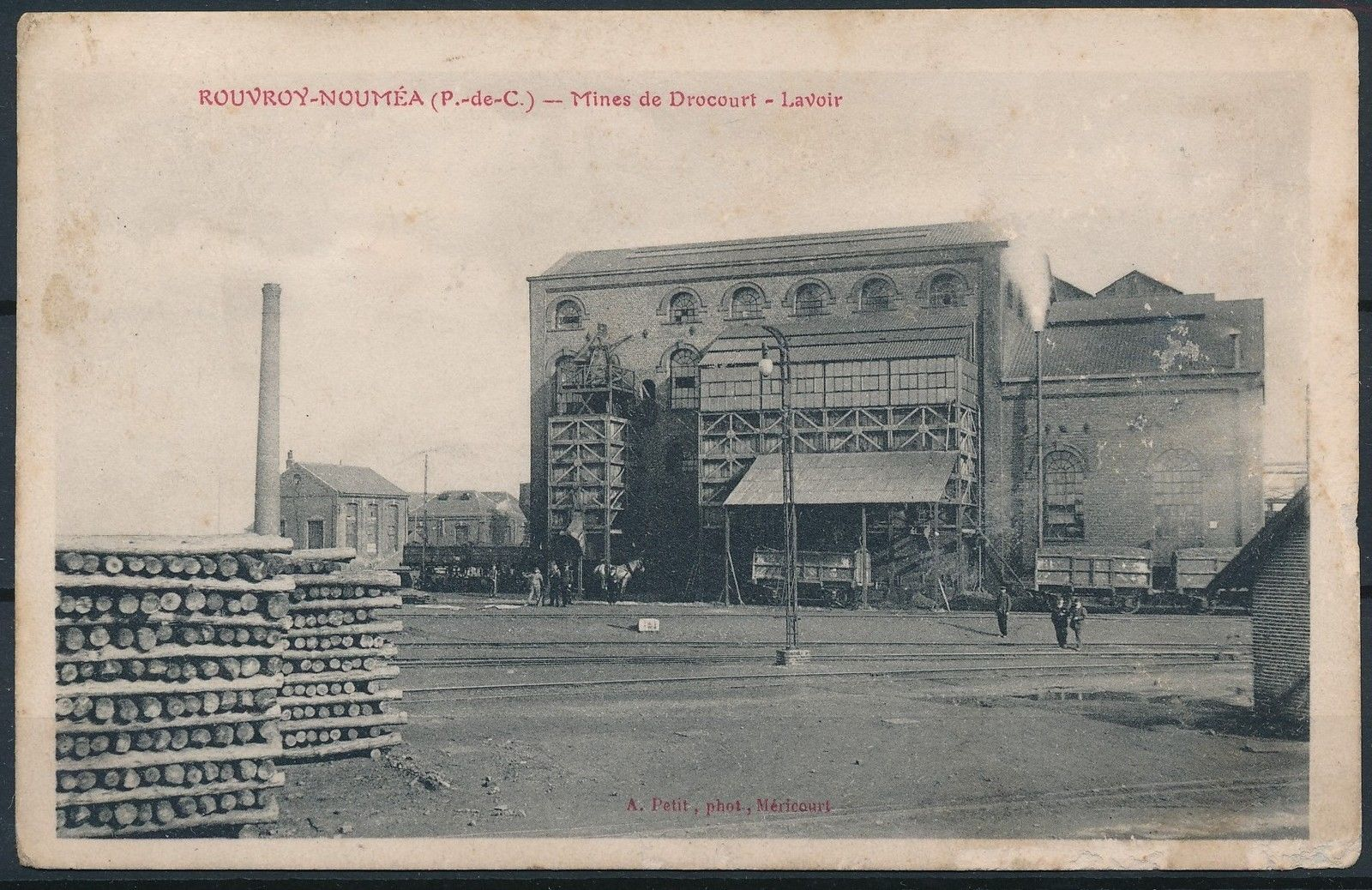 Mine de Rouvroy, lavoir, vers 1910.